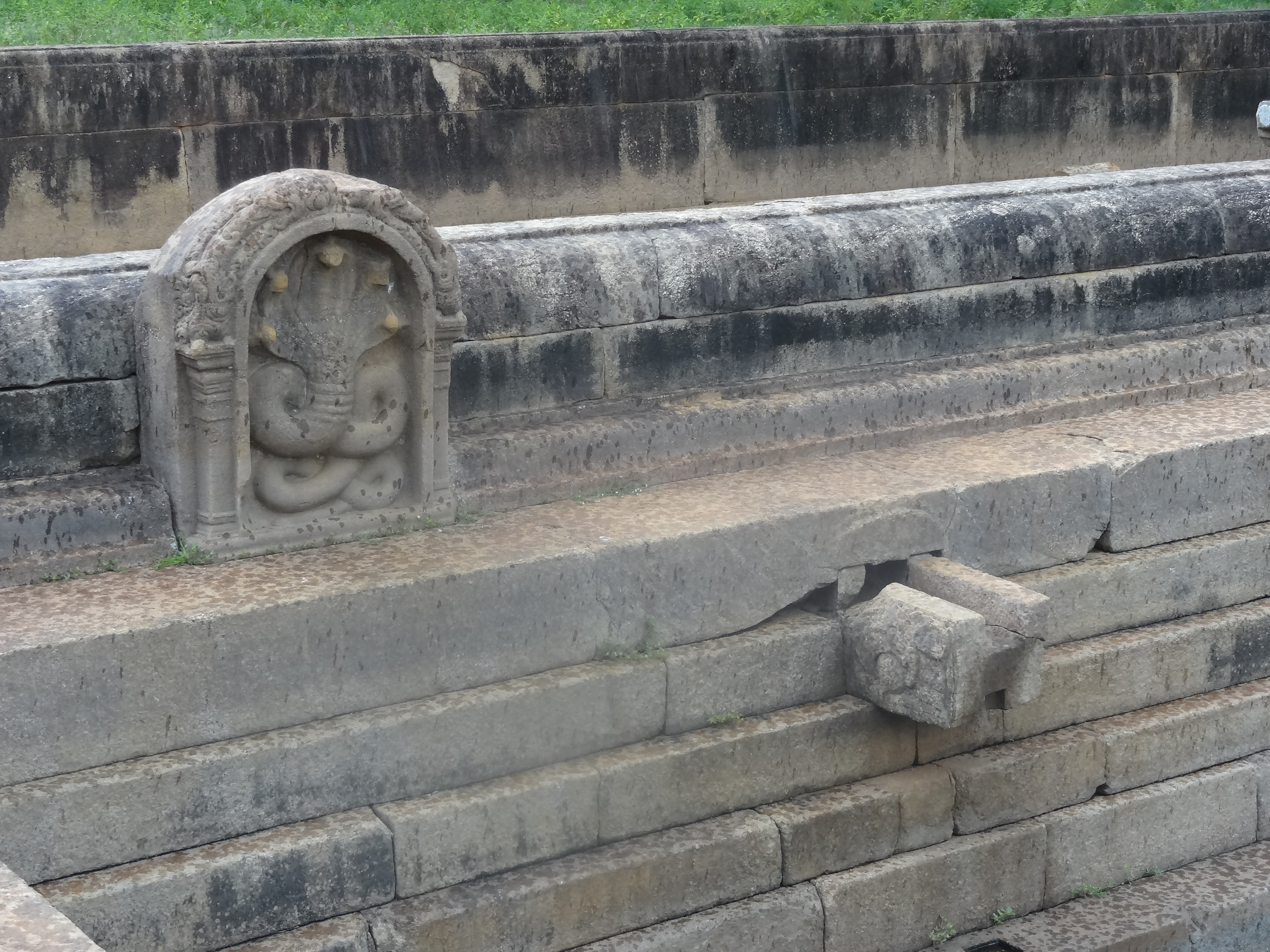 Kuttam Pokuna